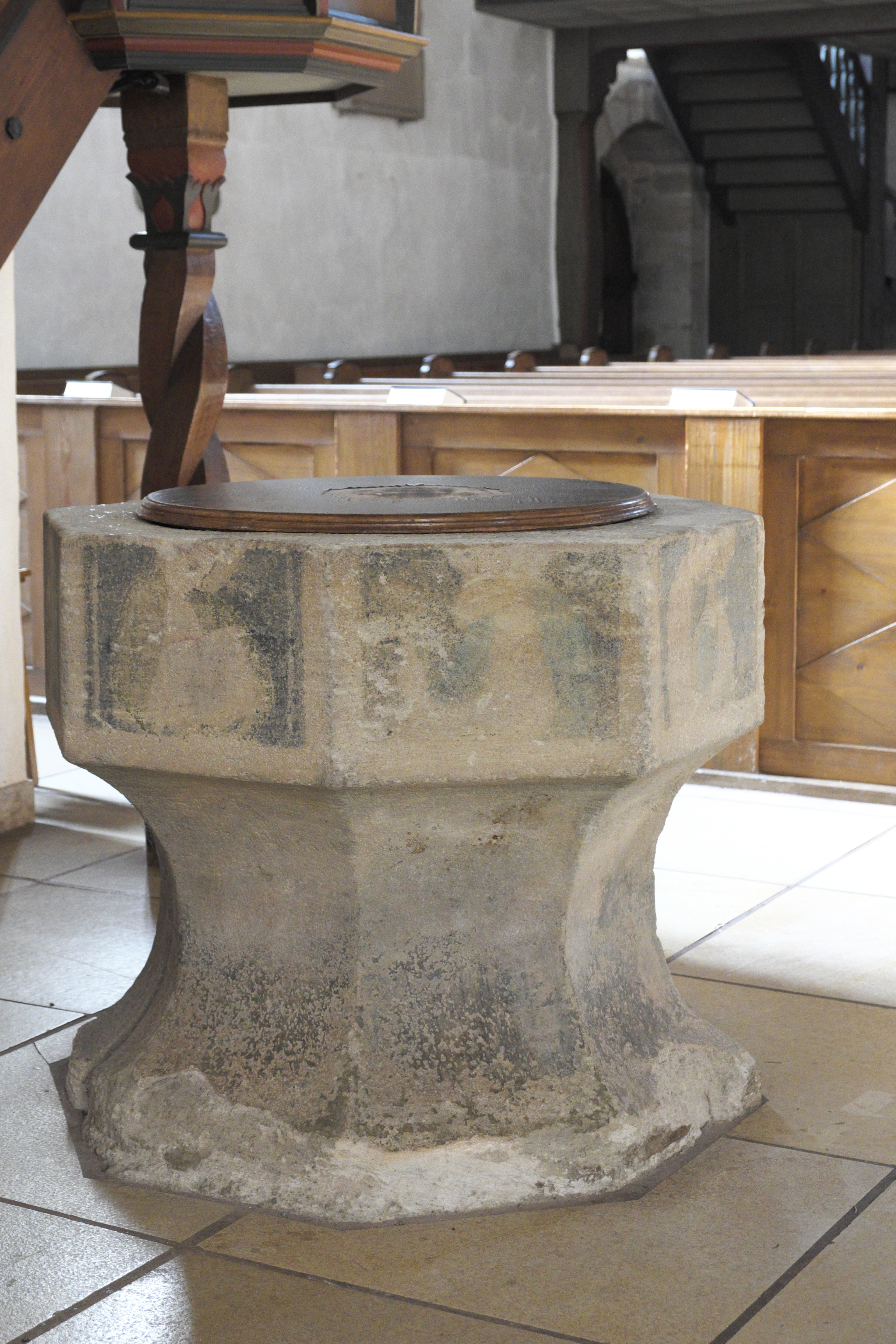 Evangelische Friedhofkirche in Balingen im Zollernalbkreis (Baden-Württemberg/Deutschland), gotischer Taufstein mit Bemalung